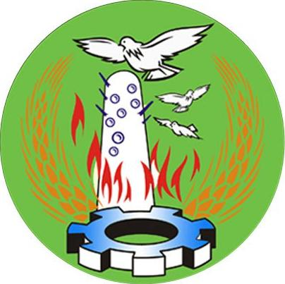 شعار محافظة المنوفية، مصر